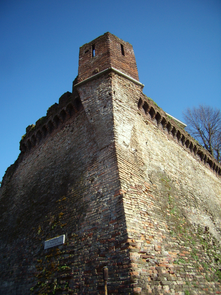 Le mura di Lodi presso la pusterla di San Vincenzo